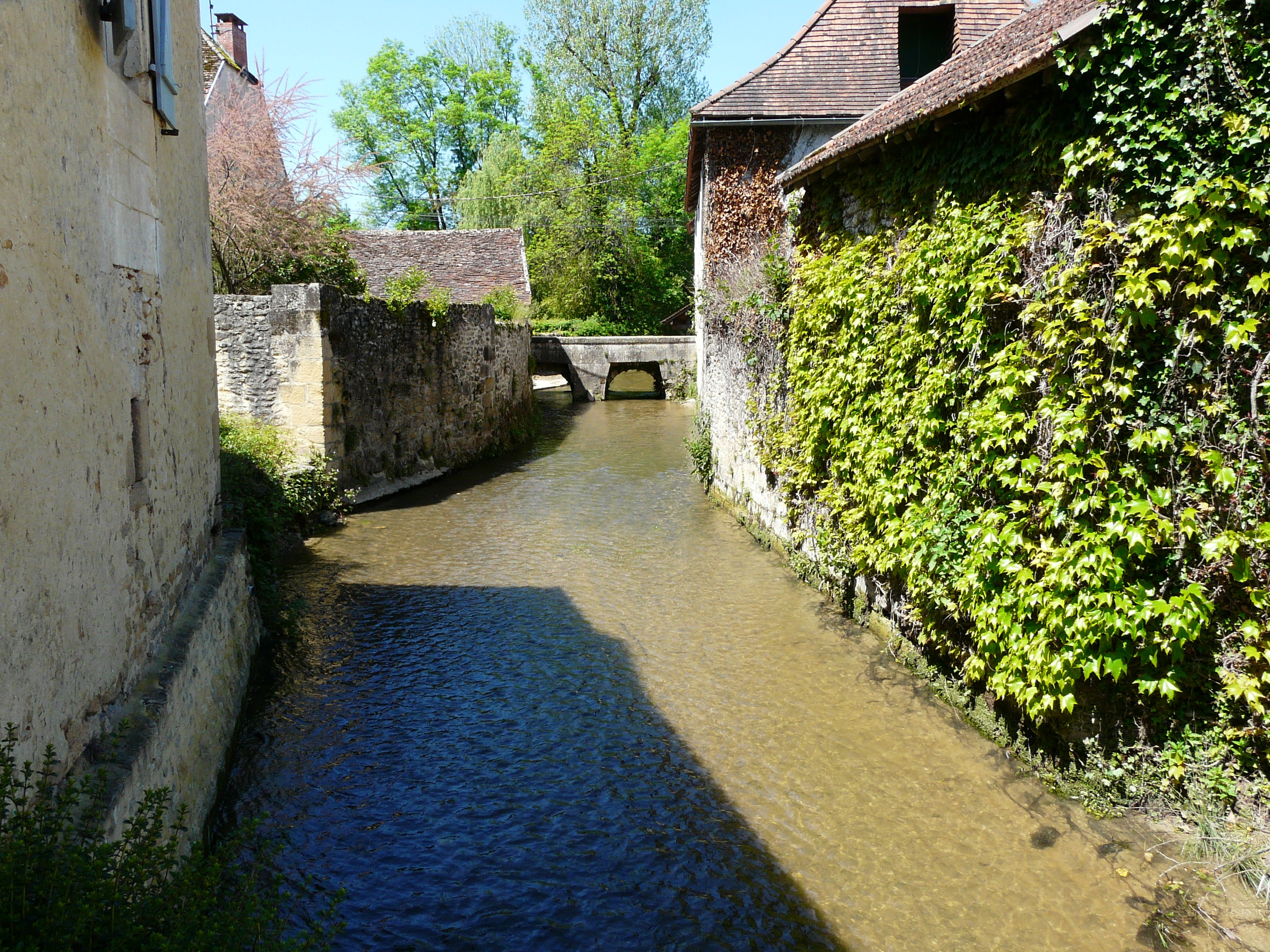 La Laurence dans le village d'Auriac-du-Périgord, Dordogne, France. Vue prise en direction de l'amont.